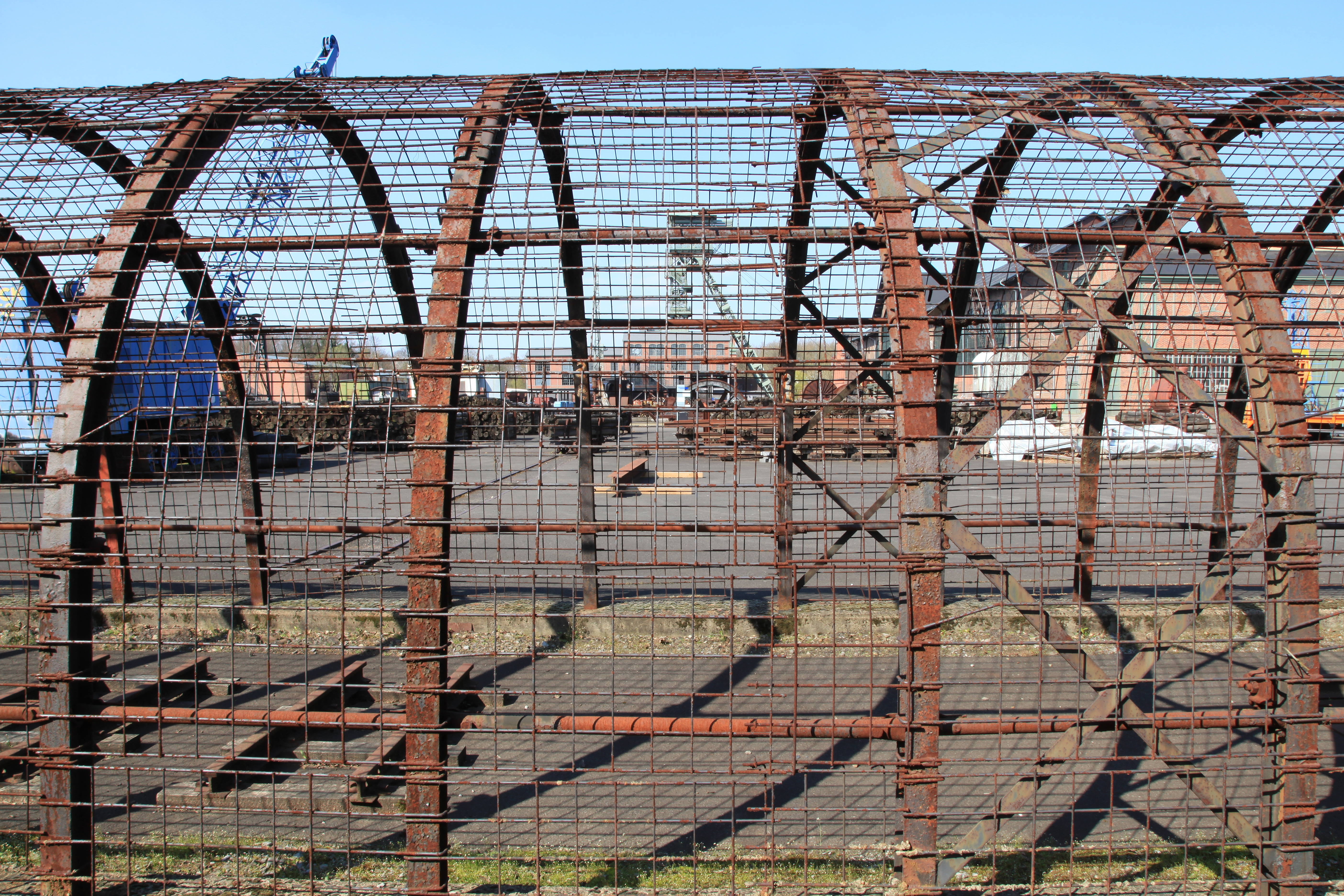 Beispielhafter Strebausbau der Zeche Zollern 2/4 in Dortmund